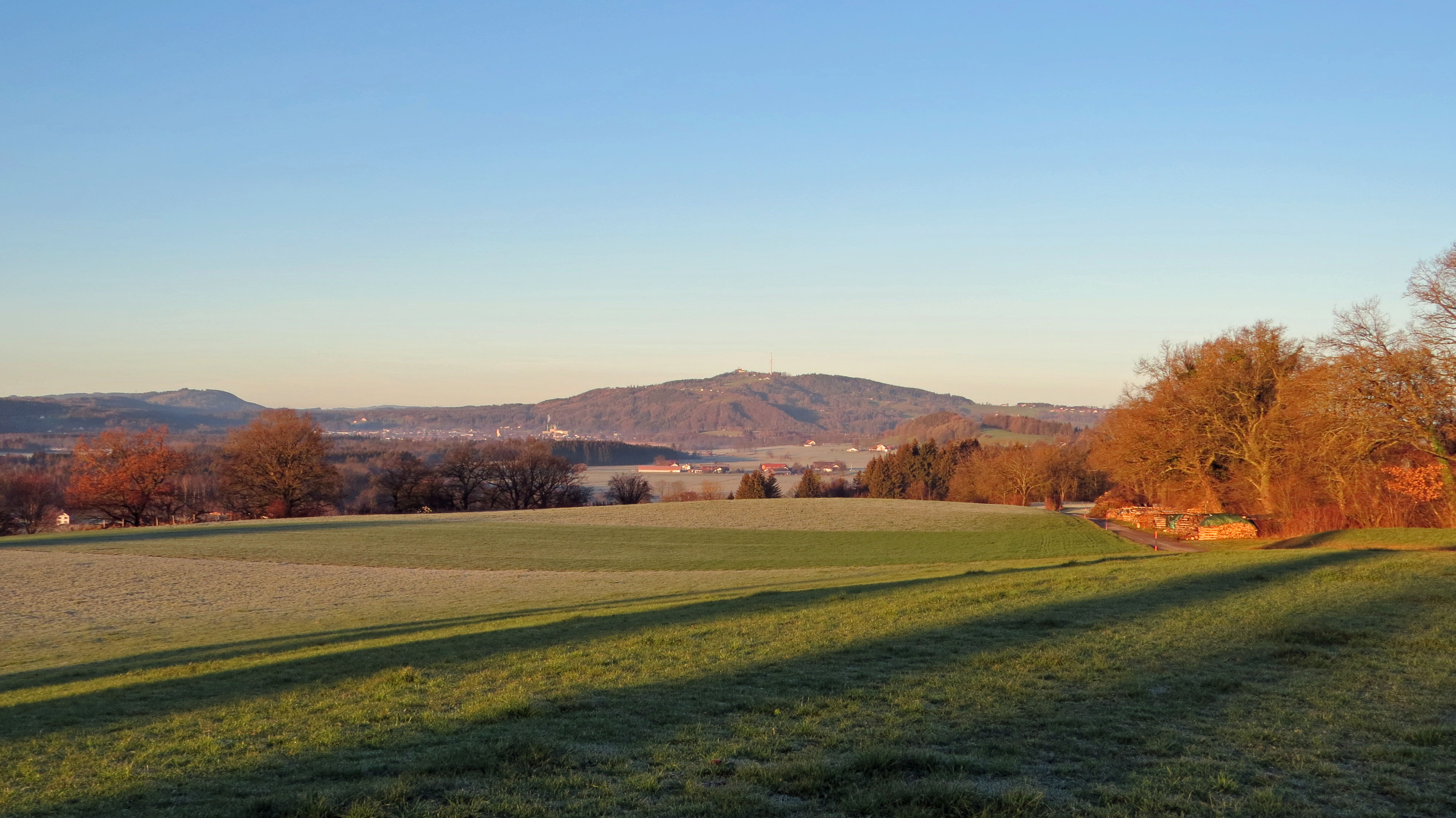 Peißenberg mit Hohem Peißenberg von Osten